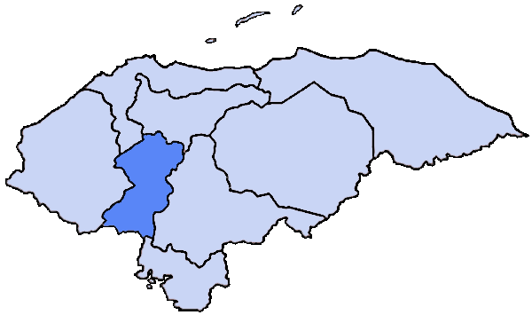 Mappa della diocesi cattolica di Comayagua, in Honduras.